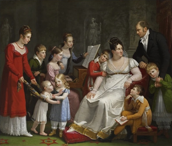 Portrait de la famille de François-Dominique Mosselman, en leur hôtel Récamier (rue de la Chaussée-d’Antin)